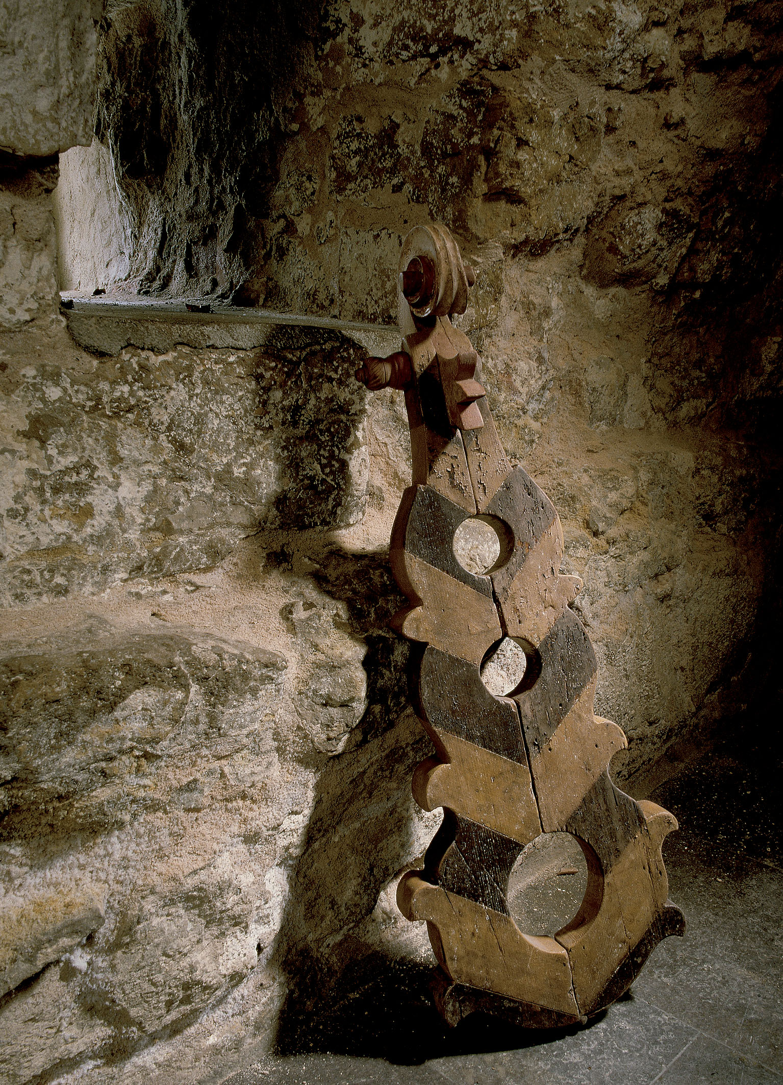 Halsgeige im Kriminalmuseum